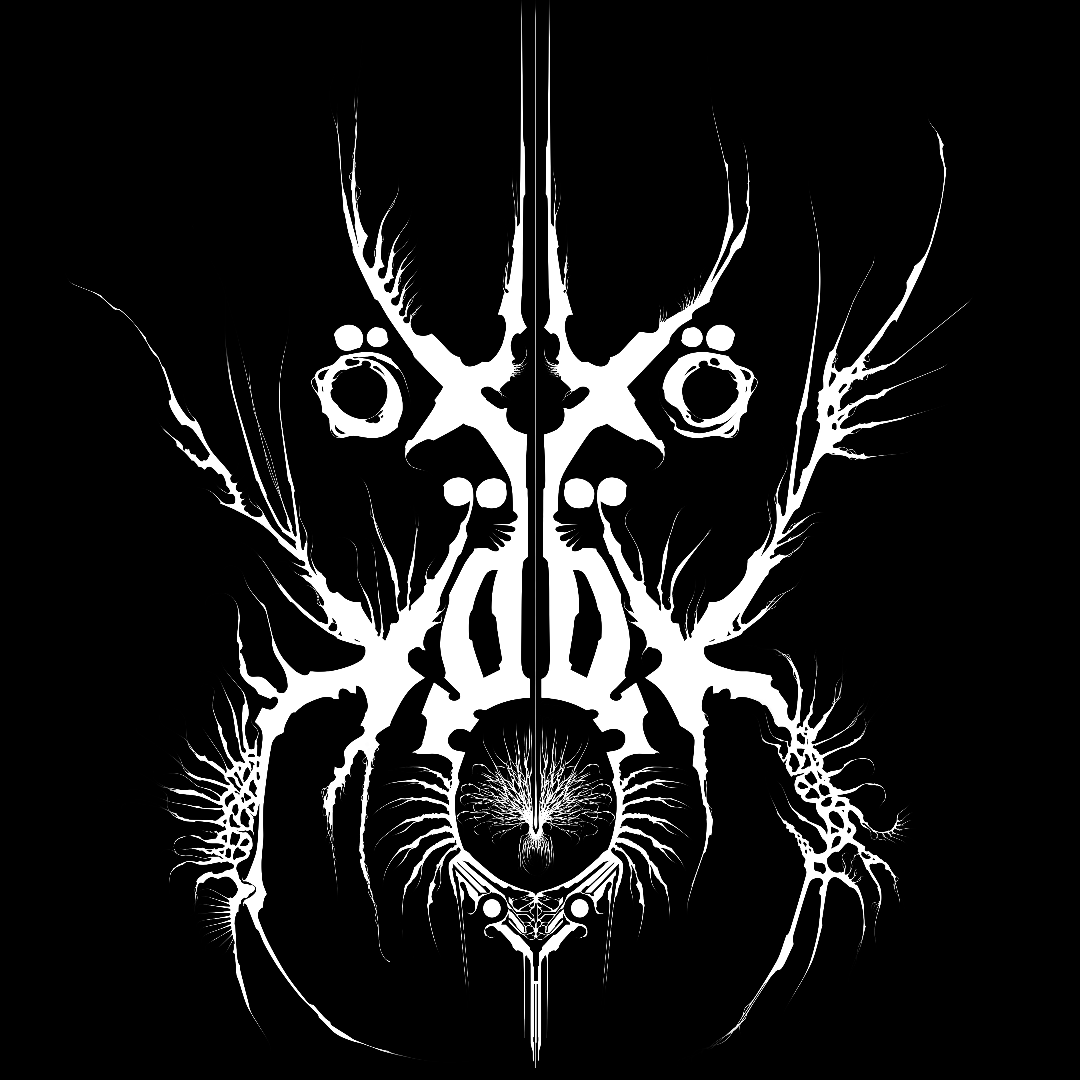 Logo d'Öxxö Xööx (album Ÿ)